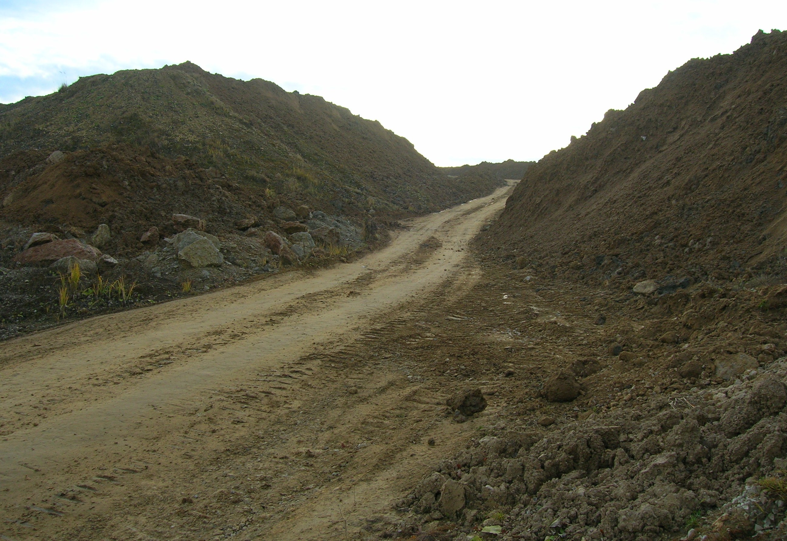 Zalas.Hałda Zachód